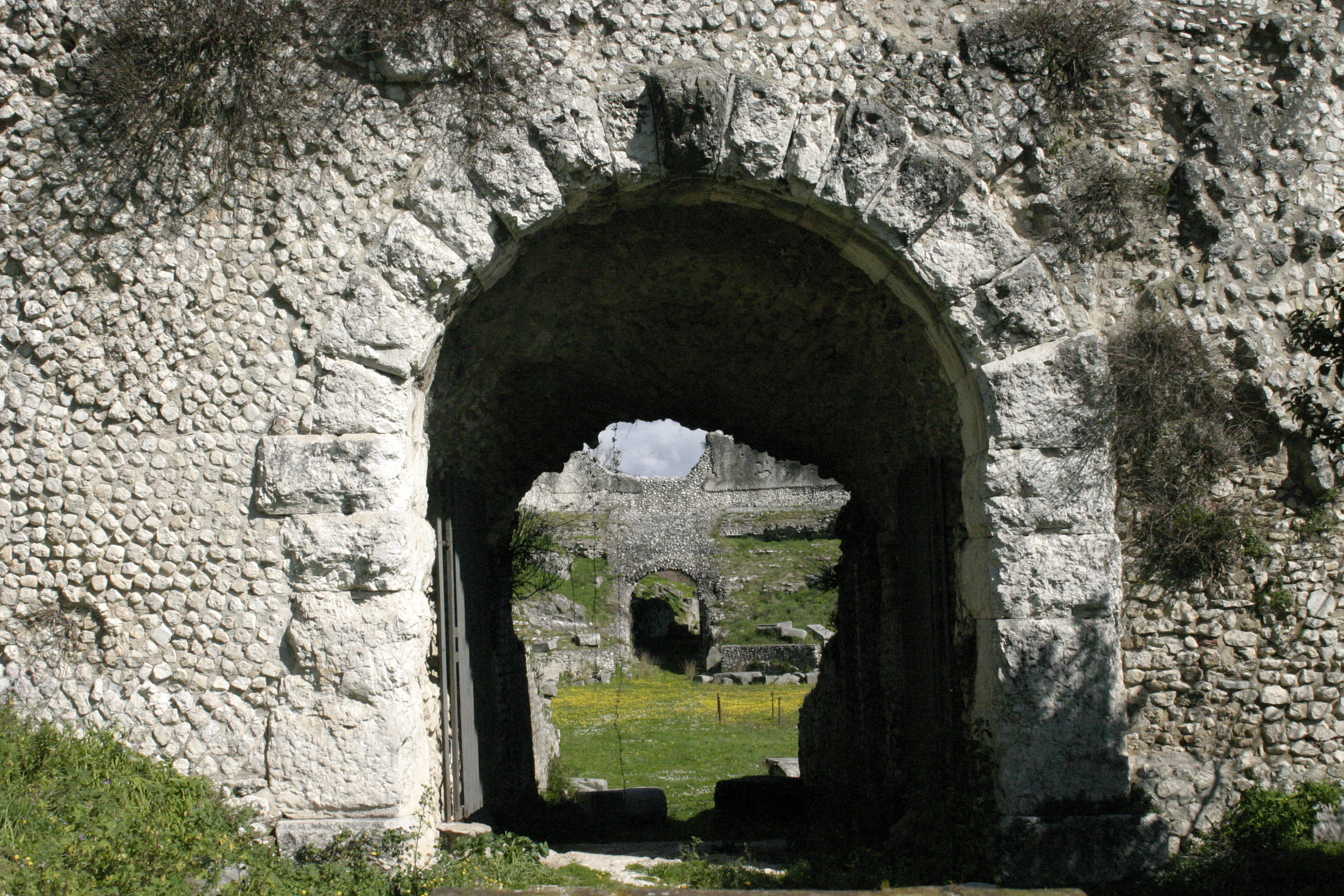 Anfiteatro romano